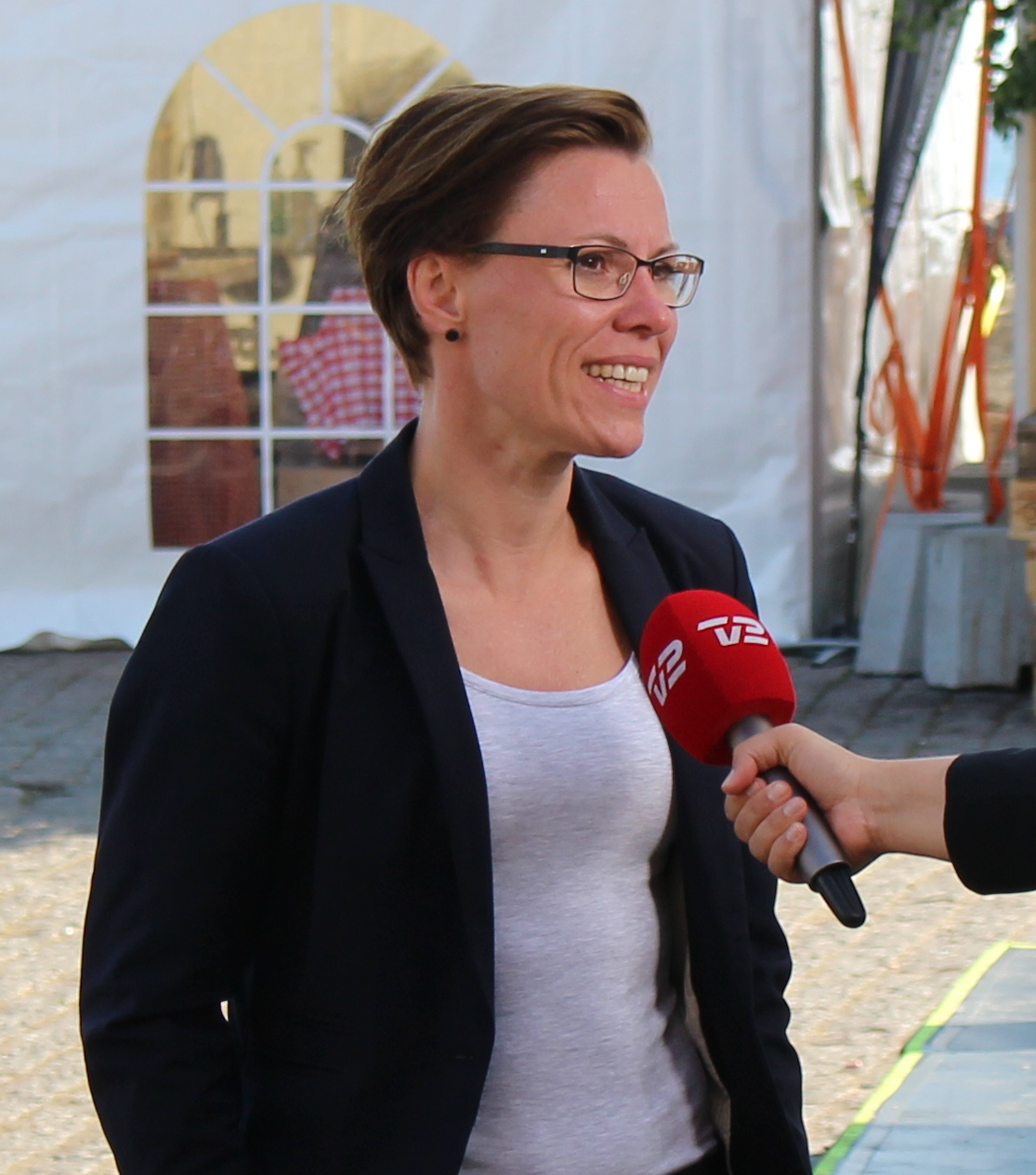 Bornholms Regionskommunes borgmester Winni Grosbøll interviewes af TV 2 på Folkemødet 2016 i Allinge Havn.